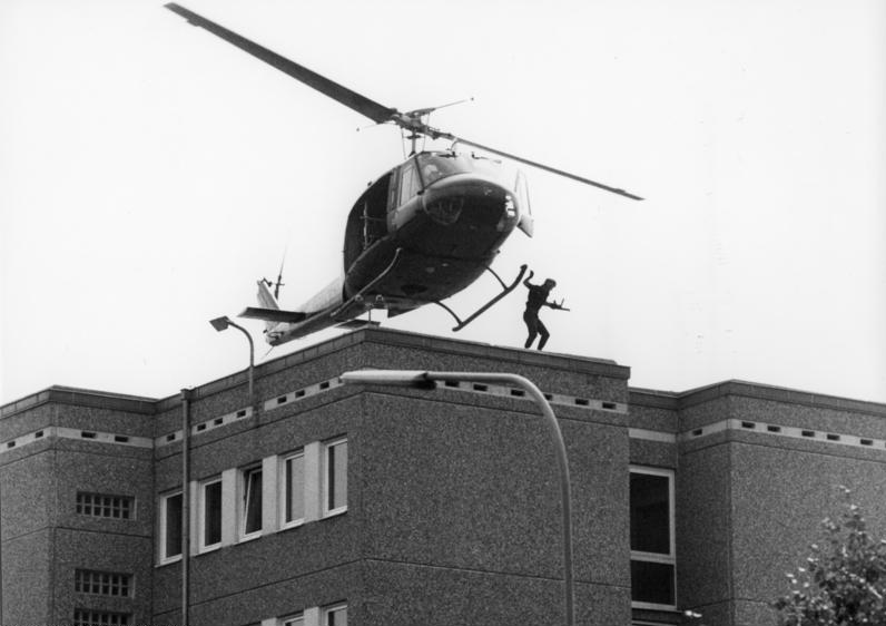 Bundeskanzler Schmidt besichtigt GSG 9 in Hangelar Angehörige der Sondereinheit des Bundesgrenzschutzes - GSG 9 - bei der Ausbildung.